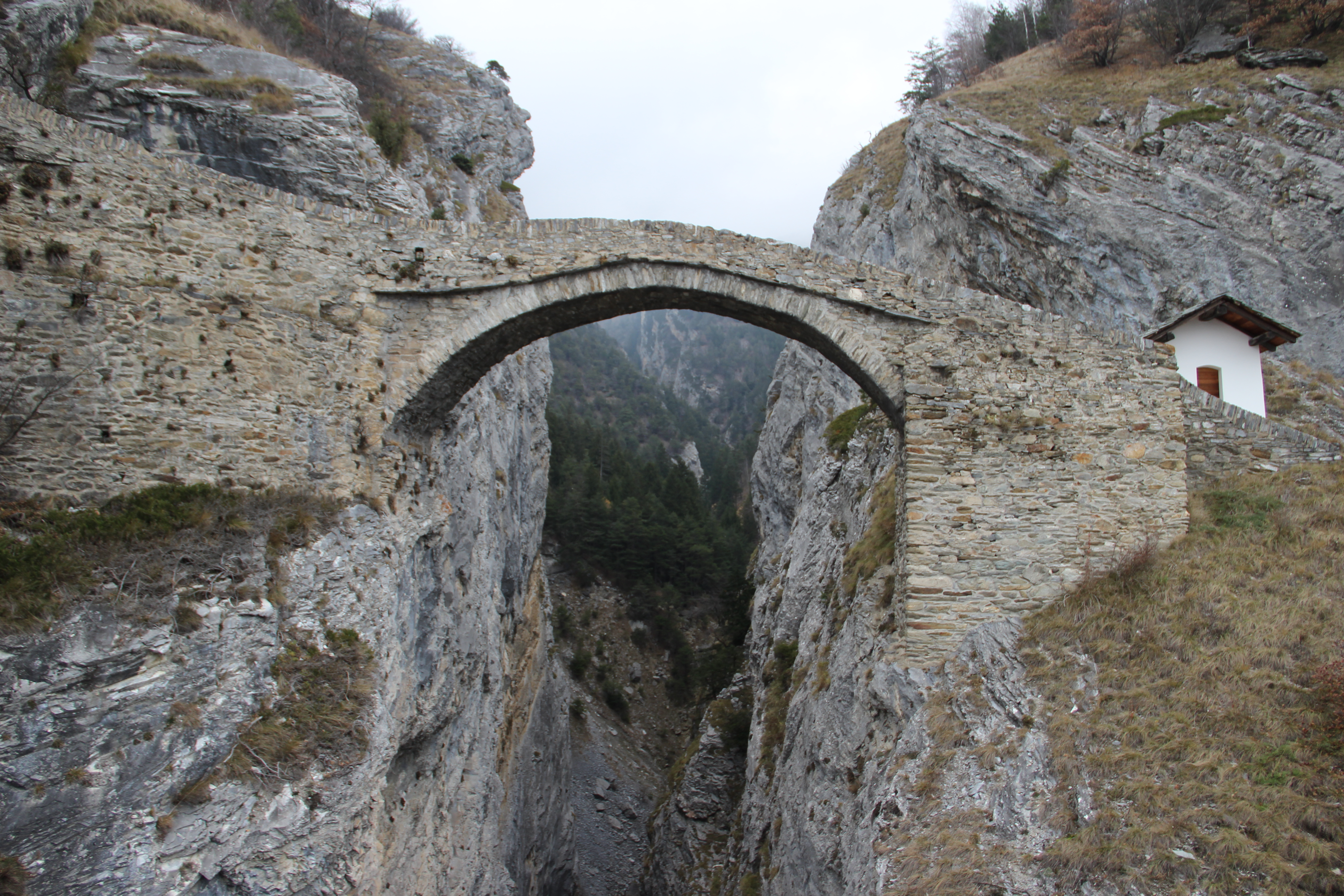 Hohe Brücke über den Feschelbach mit Kapelle